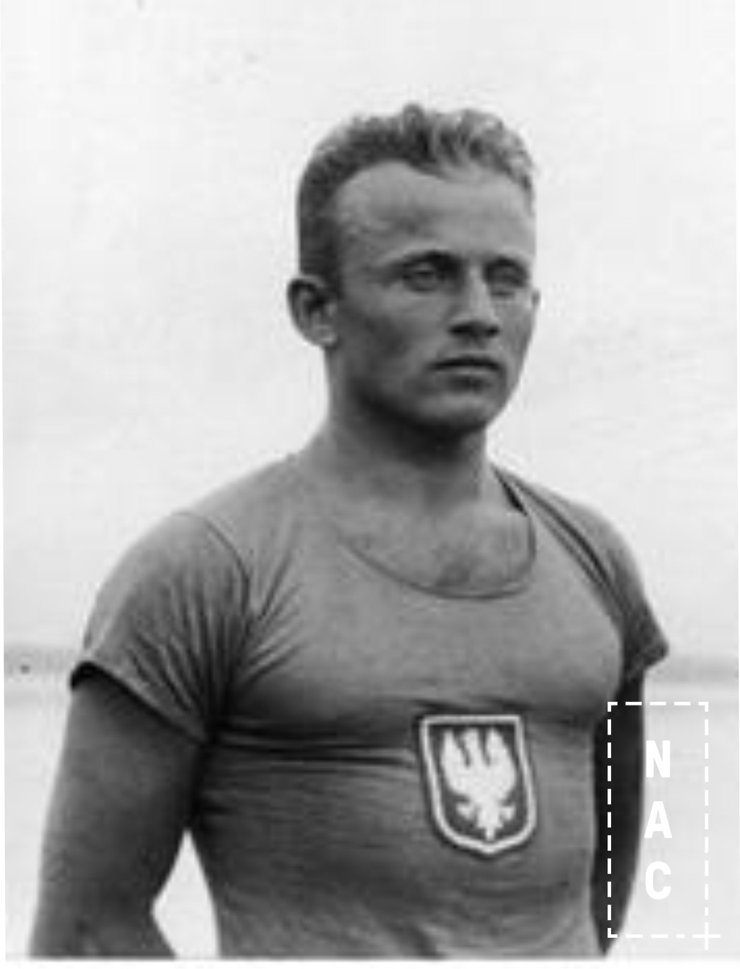 Henryk Budziński